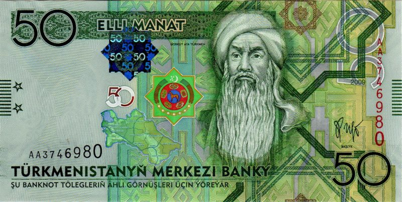 50 manat. Türkmenistan